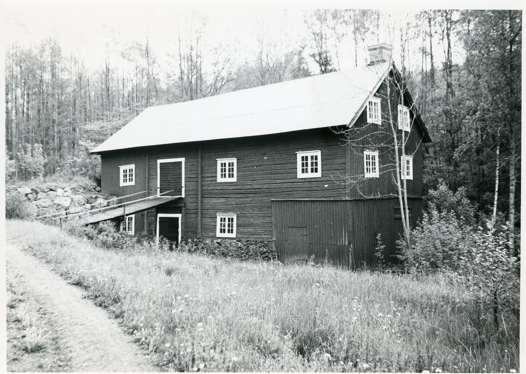 Bild på Tuvekvarn 1984